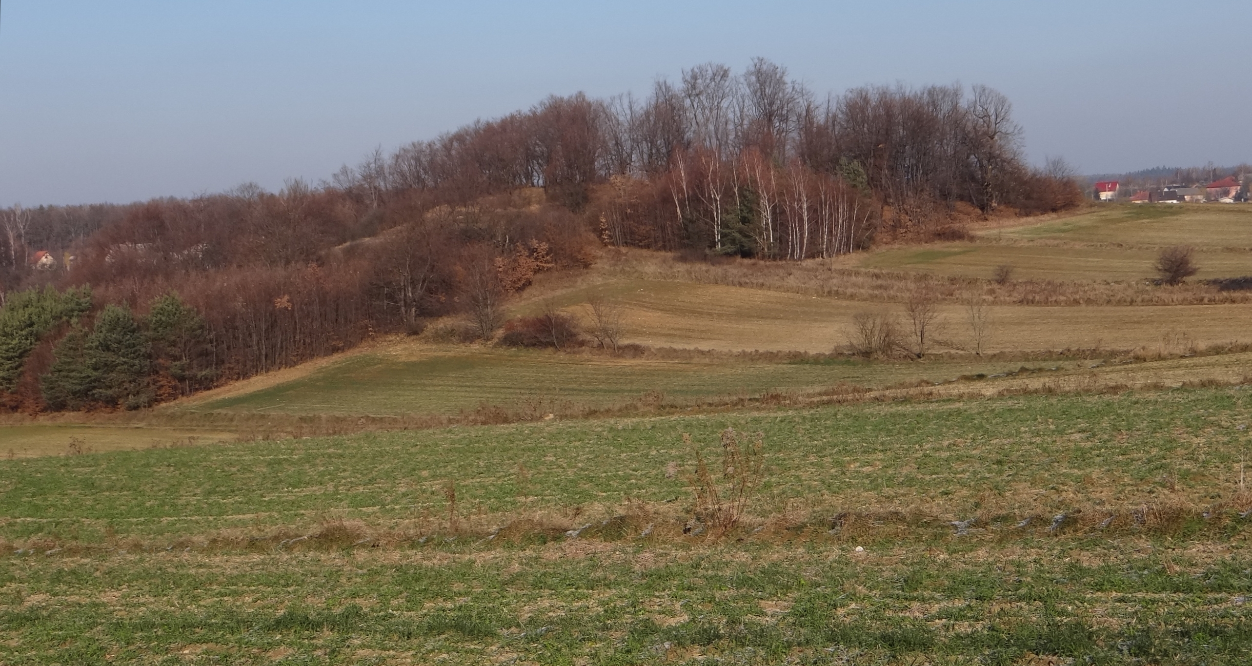 Wzniesienie Musarowa Góra w Będkowicach